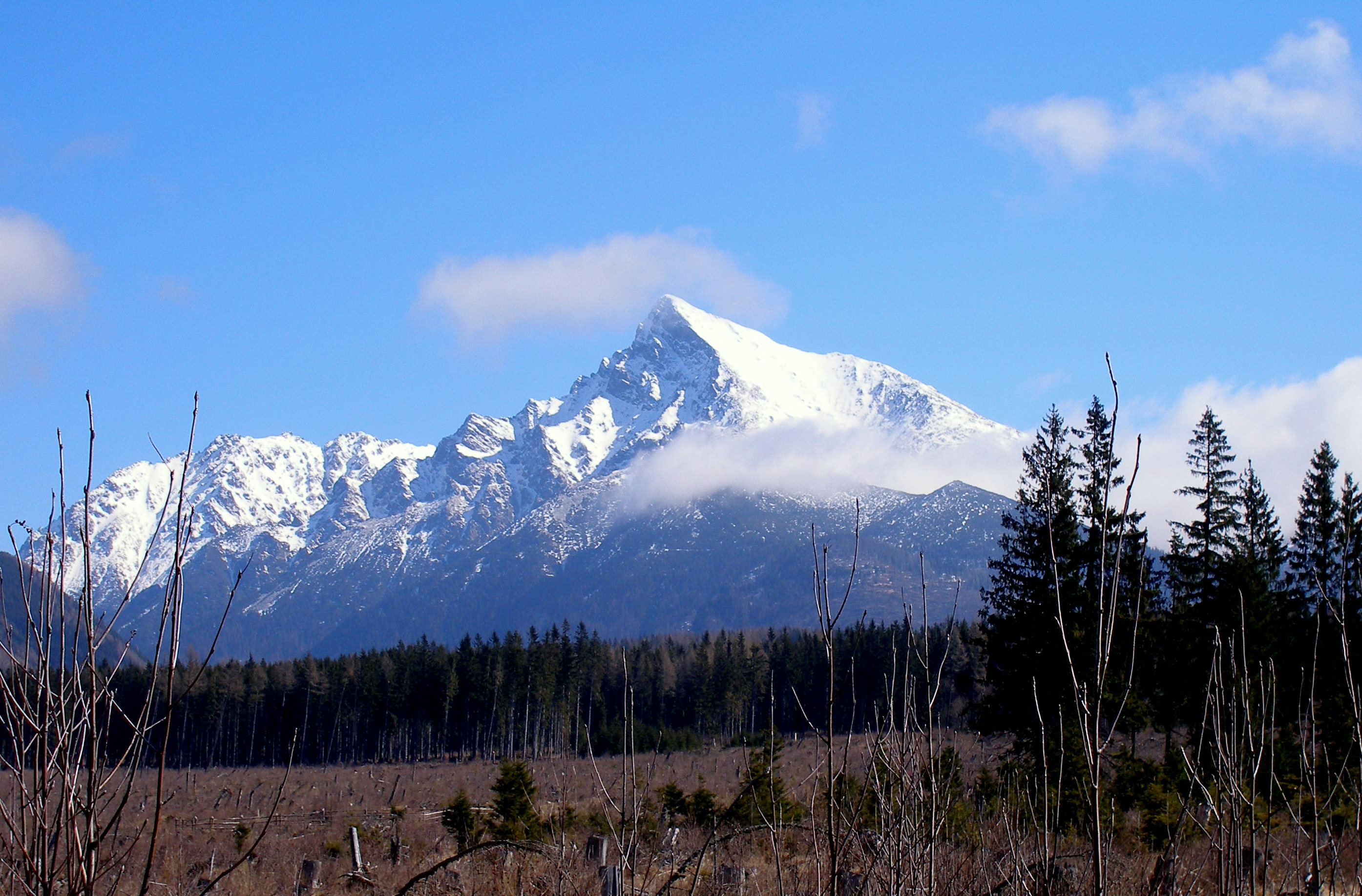 Pohľad na tatranský štít Kriváň. Slovensko Vysoké Tatry.